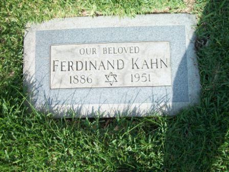 Grabstein von Ferdinand Kahn auf dem Hollywood Forever Cemetery in Hollywood, Foto: 2012.